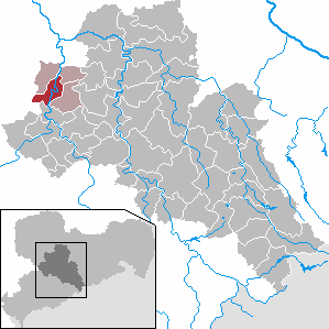 Rochlitz in Saxony - district Mittelsachsen